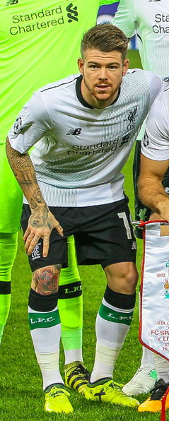 «Спартак» - «Ливерпуль»